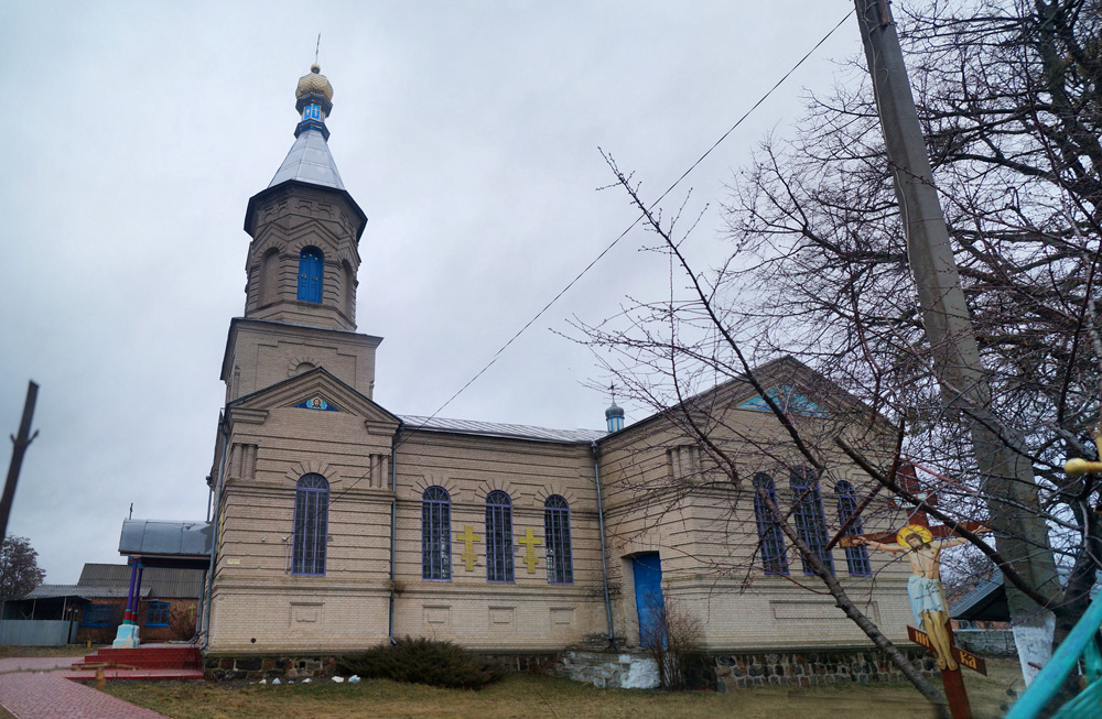 Троїцька церква у Іллінцях.